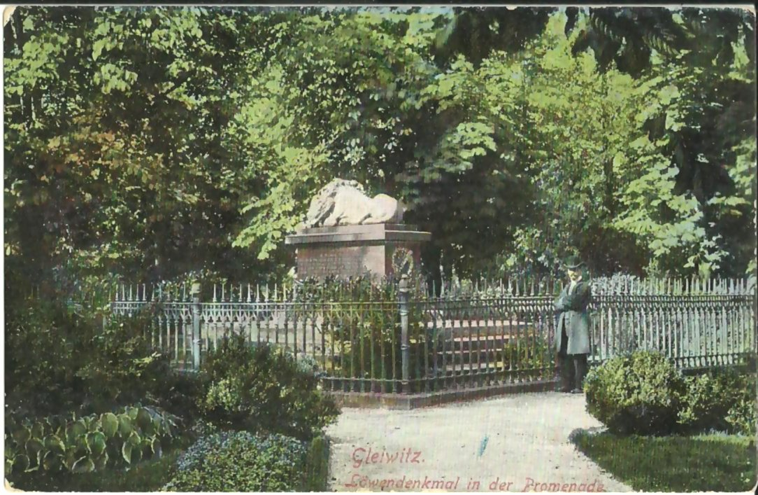 Es ist eine alte Ansichtskarte. Sie ist am 07-08-1907 gelaufen. Sie zeigt das 1845 zerstörte Löwendenkmal in der Promenade in Gleiwitz / Oberschlesien.